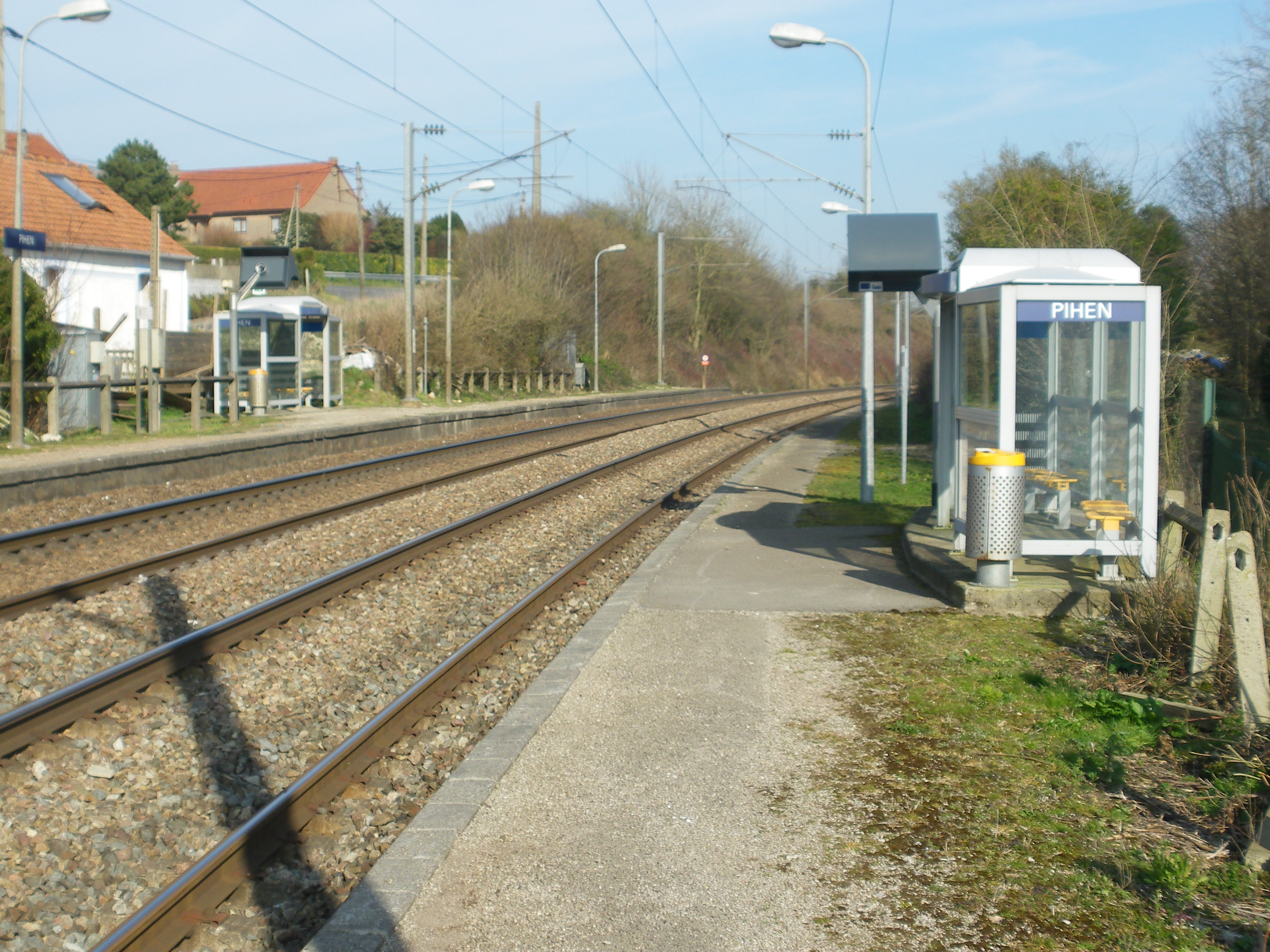 Vue des quais et des voies de la gare de Pihen.